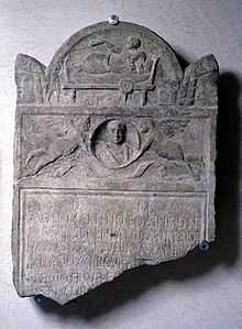 lapide